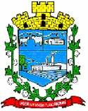 Brasão do Municíío de Rancharia - SP - Brasil.